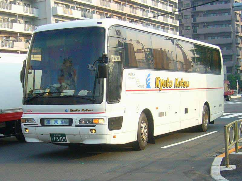 登録番号：京都200か13-09 京都交通所属 car no.F802 シルフィード号用 三菱ふそう・エアロクィーン KC-MS822PA